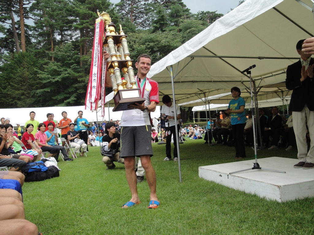 Jonathan Wyatt con il trofeo del vincitore alla Mount Fuji Race in Giappone